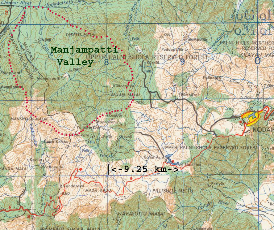 Manjampatti Valley,Palani Hills, Tamil Nadu, India